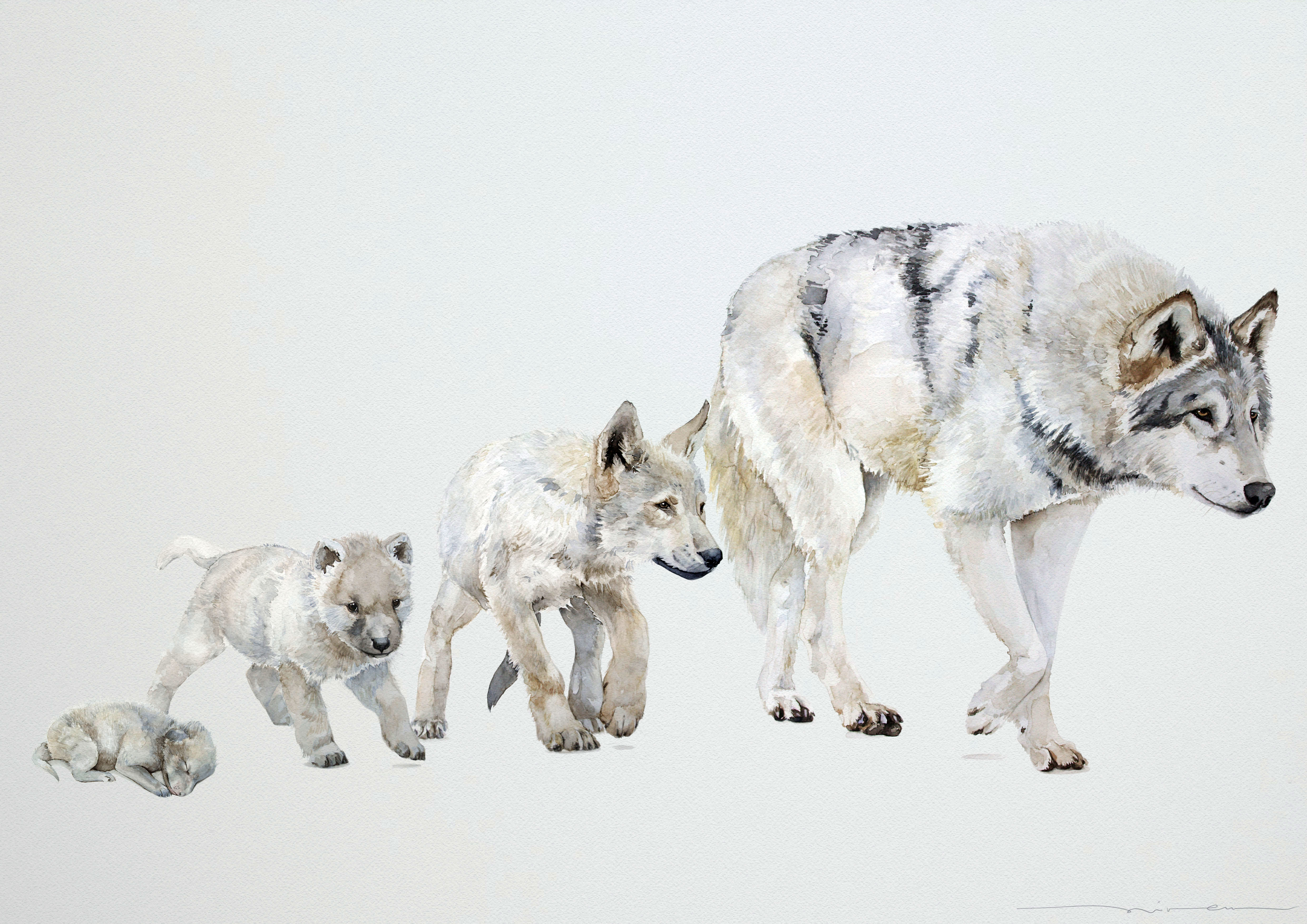 Se muestran 4 etapas del crecimiento del lobo gris canadiense: recién nacido, tres semanas de vida, dos meses y finalmente el lobo adulto de un año.